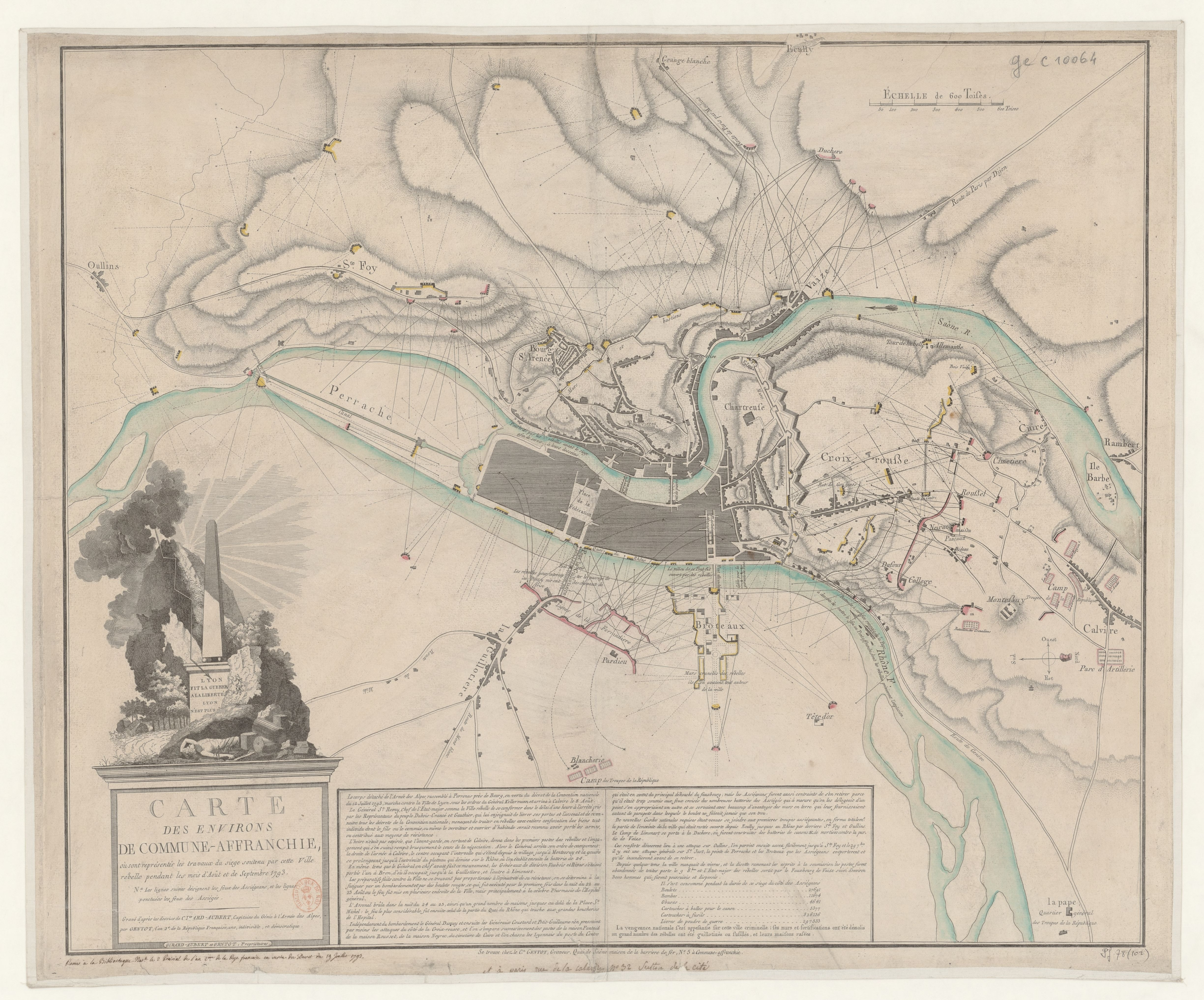 Carte des environs de Commune-Affranchie, où sont représentés les travaux du siège soutenu par cette Ville rebelle pendant les mois d Août et de Septembre 1793. Na. Les lignes suivies désigent les feux des Assiégeants, et les lignes ponctuées les feux des Assiégés. Echelle de 600 Toises [=Om. 091 ; 1 : 12 800 environ] / Gravé d après les dessins de Girard-Aubert, Capitaine du Génie de l Armée des Alpes, par Gentot, l an 2e de la République Française, une, indivisible et démocratique.